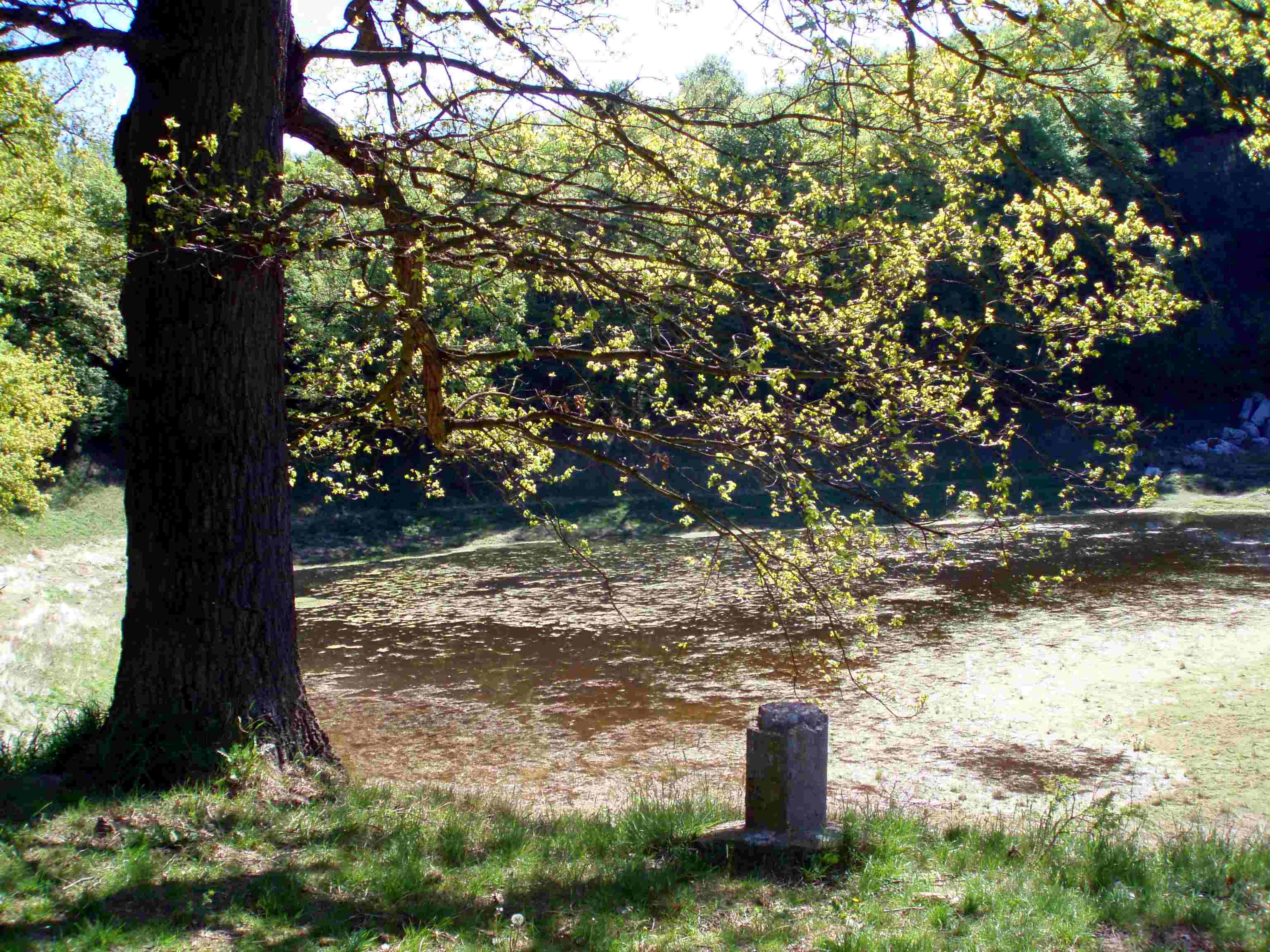 Bauerngraben im Naturschutzgebiet „Gipskarstlandschaft Questenberg“